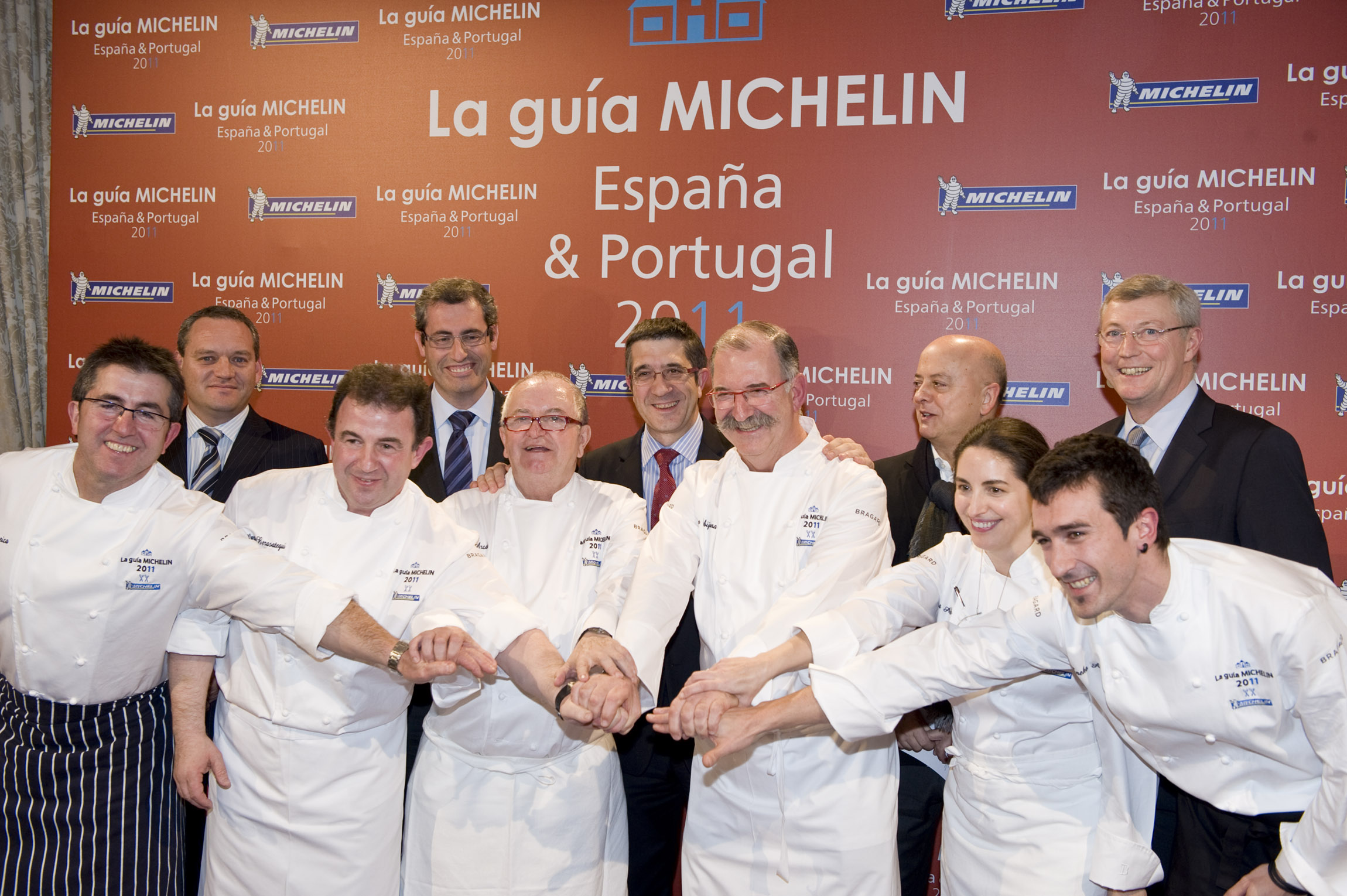 El Lehendakari ha presidido la presentación de la Guía Michelín en San Sebastián // Lehendakaria Michelin Gida aurkezteko ekitaldiaren buru izan da Donostian